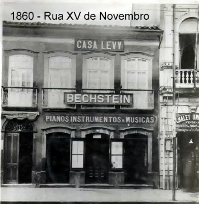 Foto da loja de pianos CASA LEVY DE PIANOS no ano de 1860